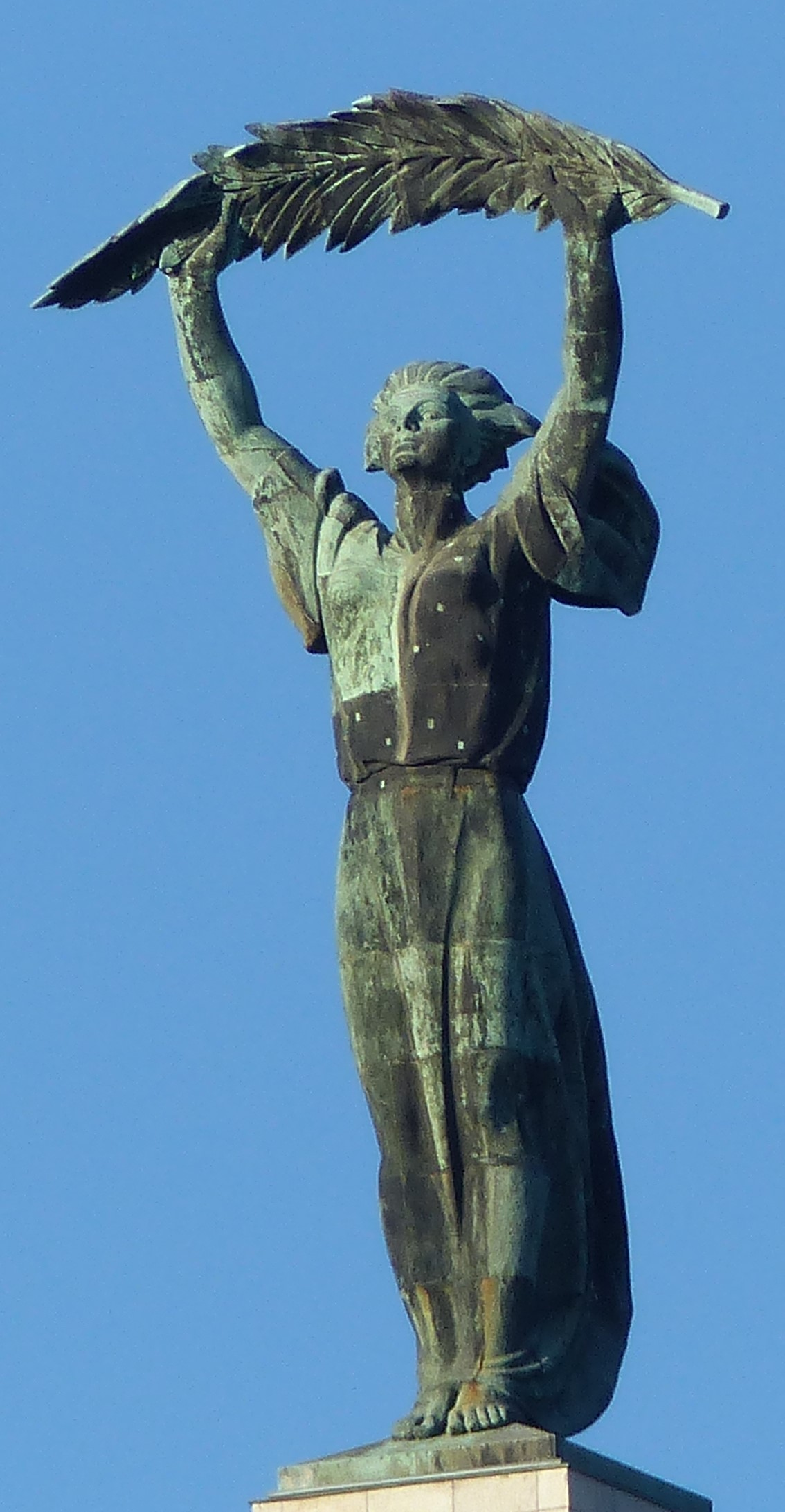 Szabadság szobor, Gellért-hegy.